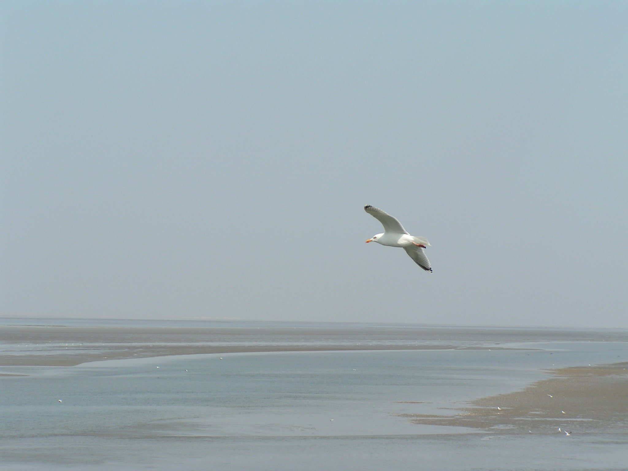 Meeuw Larus argentatus boven Fries wad